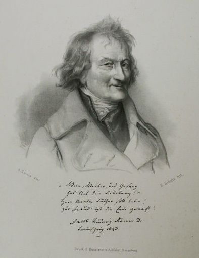 Porträt-Lithographie von Jacob Ludwig Römer (* 1770 in Einbeck; + 1855 in Braunschweig), Gymnasiallehrer am Katharineum in Braunschweig, später Kabinettsrat und Konsistorialrat [1], Schriftsteller und Dichter [2] Unter der Darstellung ist ein vierzeiliger handschriftlicher Text des Dargestellten wiedergegeben: "Wein, Weiber, und Gesang hab' lieb dein Lebelang!" Herr Martin Luther soll leben! Zur Freud' ist die Erde gemacht! Jacob Ludwig Römer Dr. Braunschweig 1843.